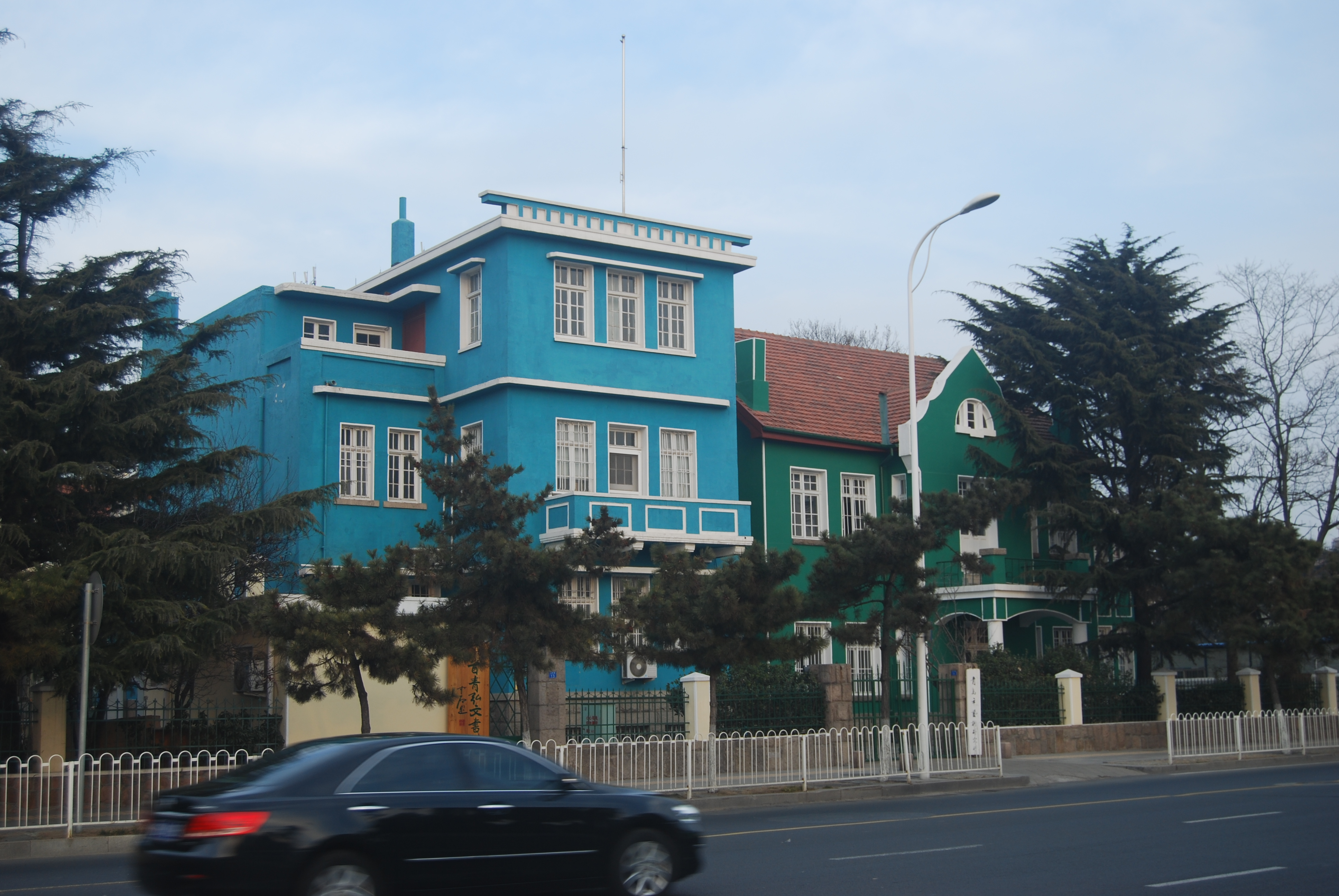 青岛太平路11号、13号